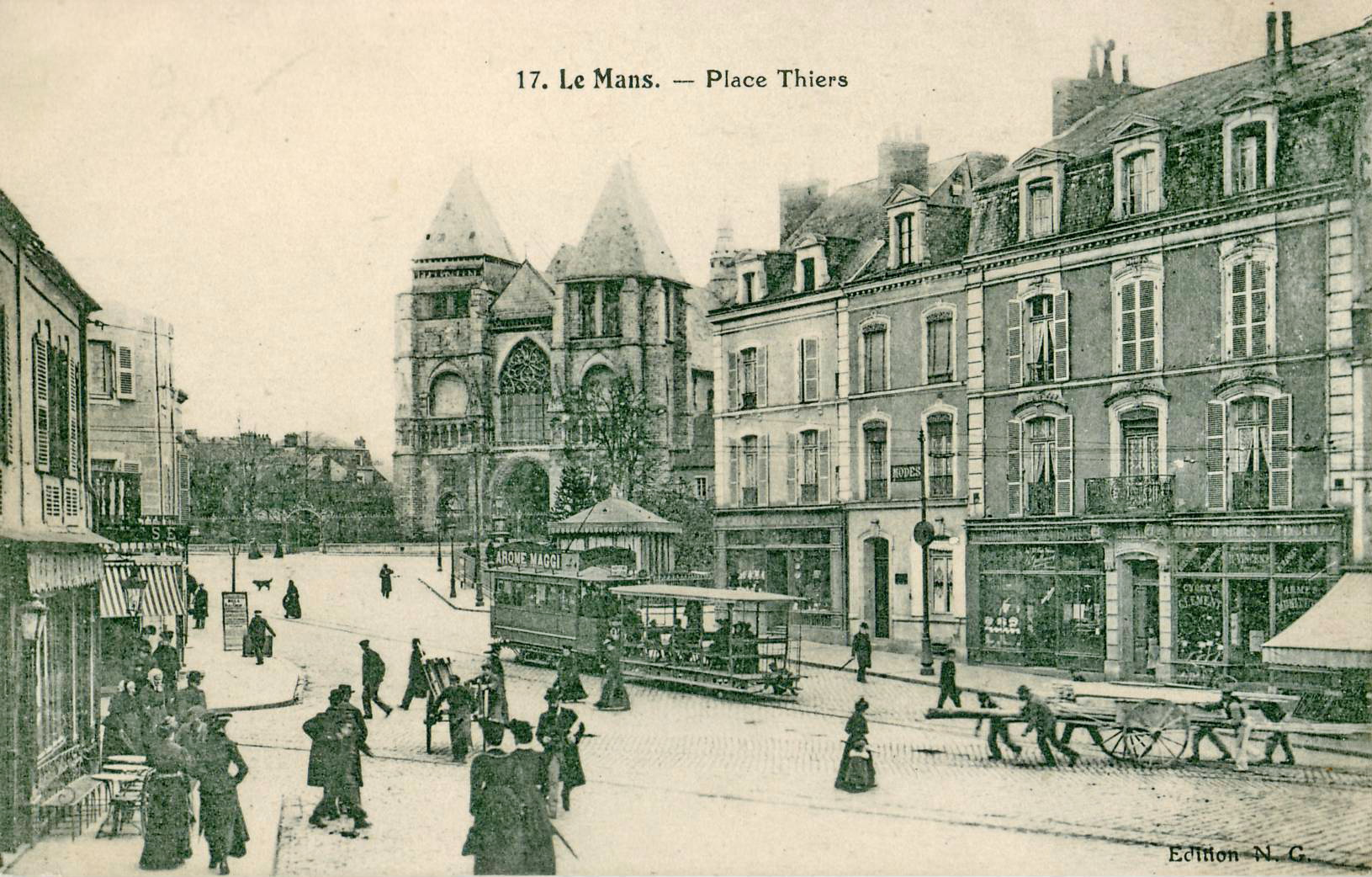 Carte postale ancienne, éditée par N. G., n°17 Le Mans - Place Thiers Vue d'une rame du tramway du Mans